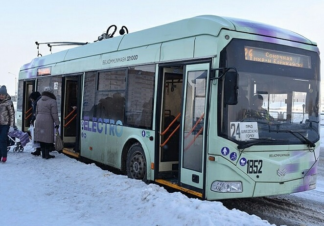 Тролейбус